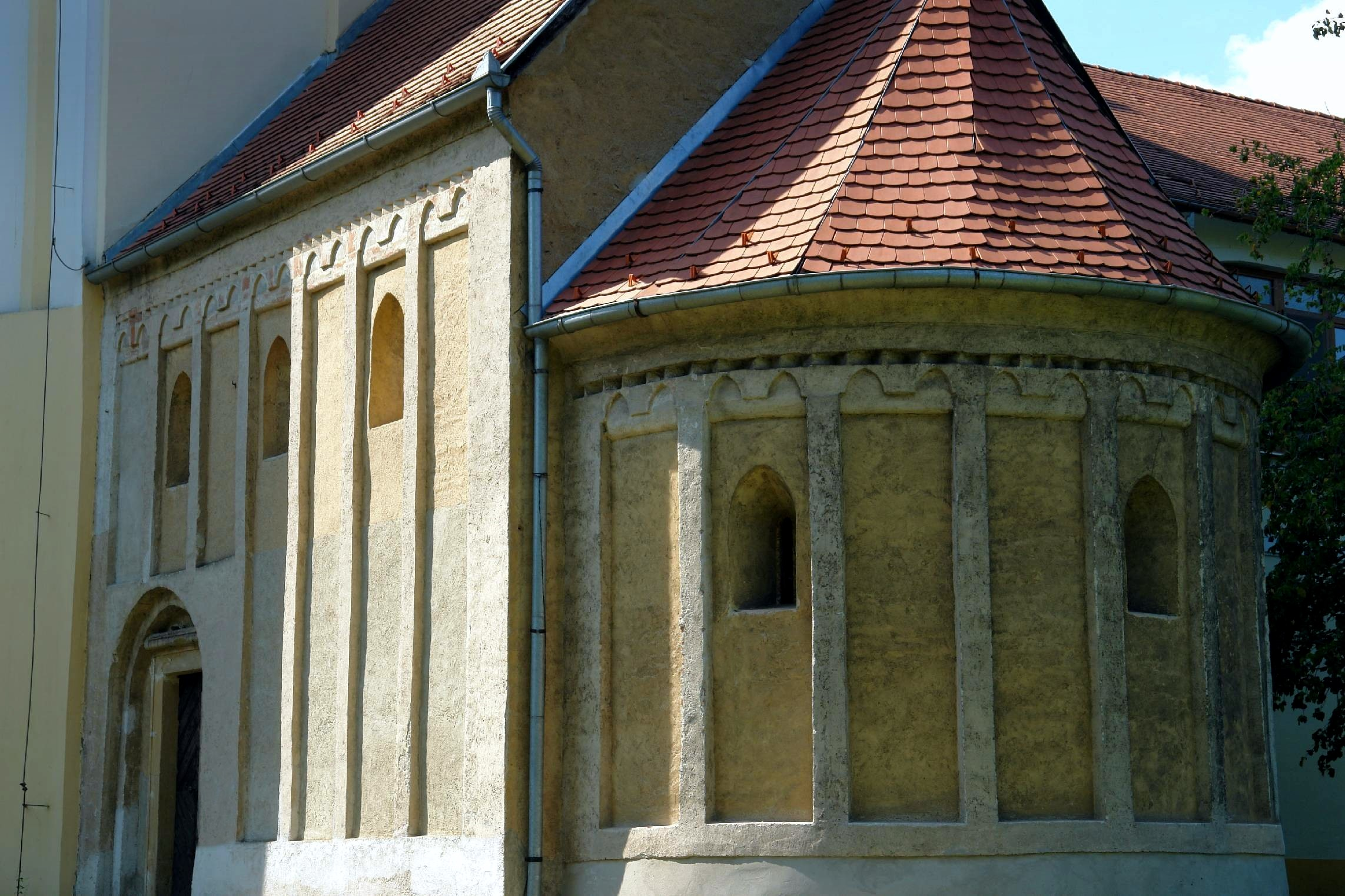 Egykori ferences templom és kápolna, Búcsúszentlászló, Arany János utca 15. This is a photo of a monument in Hungary. Identifier: 10790